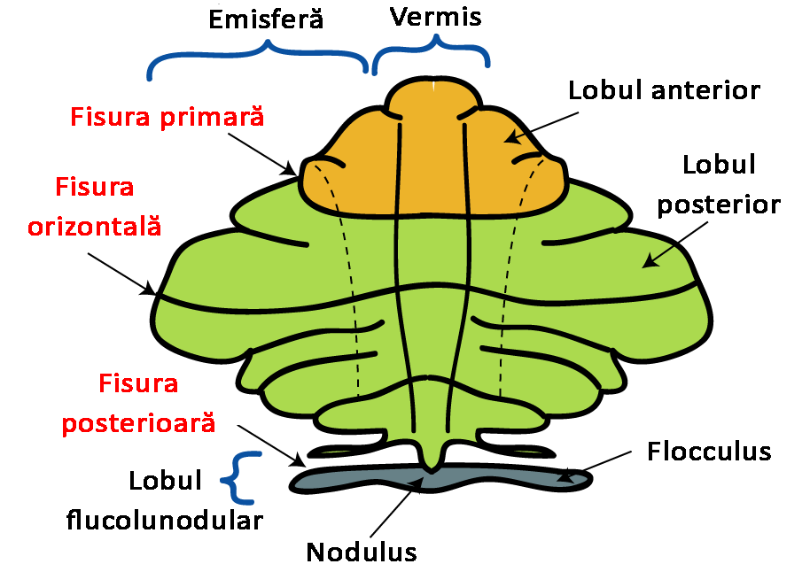 Reprezentare schematică a diviziunilor anatomice majore are cerebelului. Tradus din engleză.